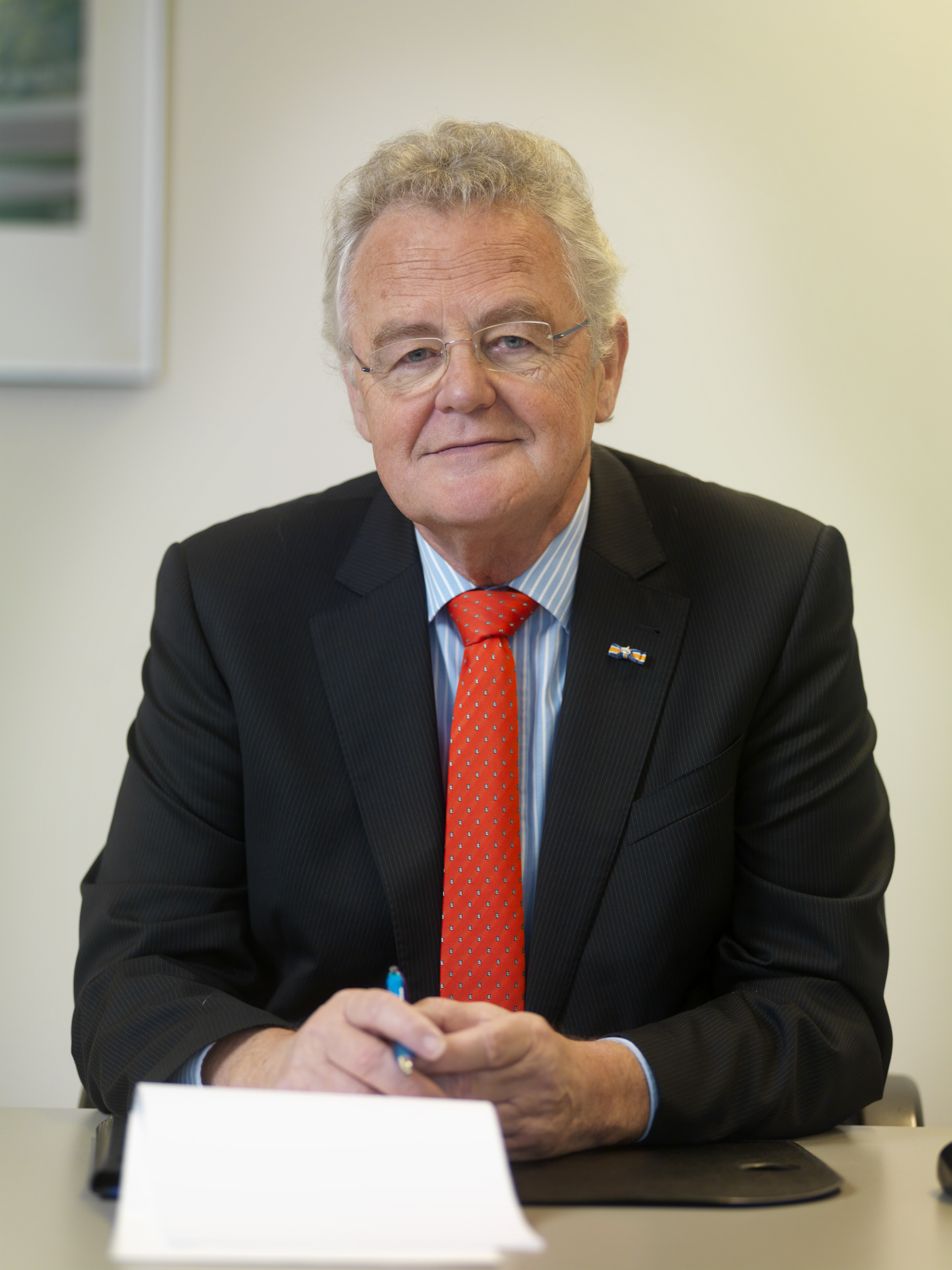 Frans Ronnes